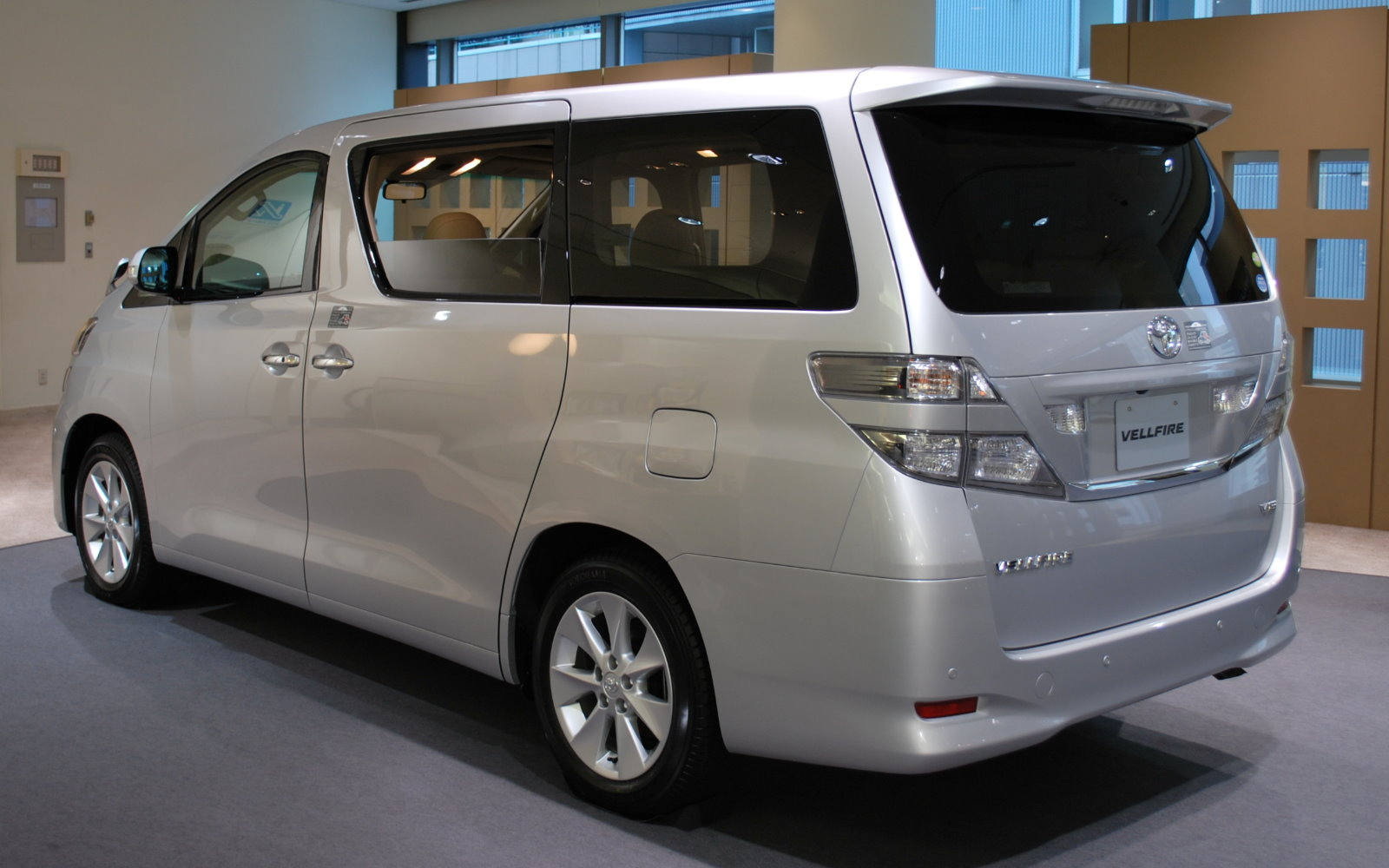 Toyota Vellfire (2008 - )